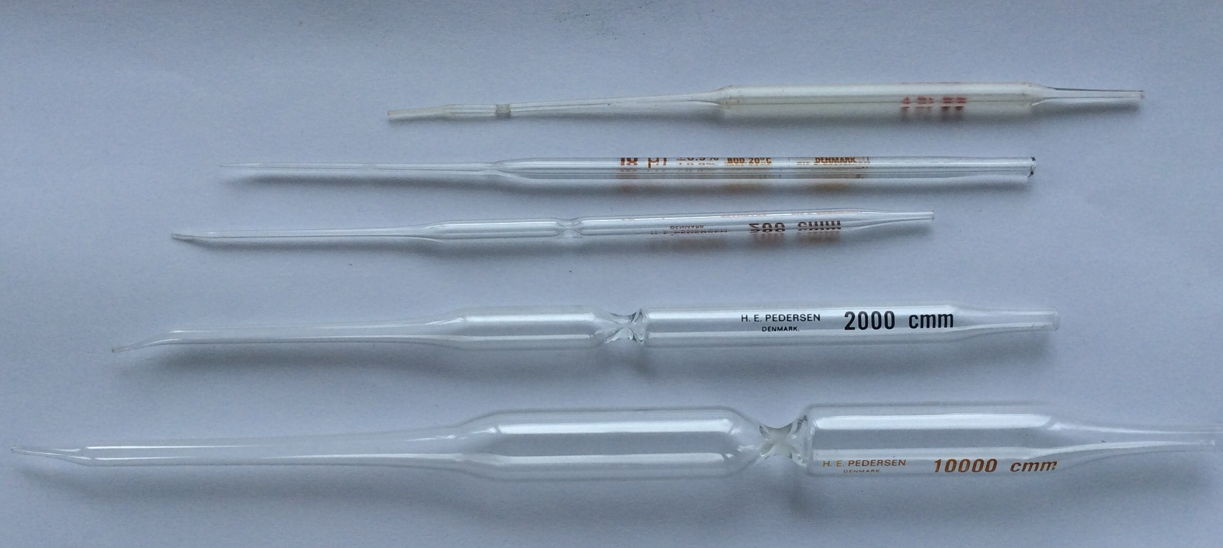 Carlsberg pipettes glass micropipettes, named for the place for their invention and first use, The Carlsberg Laboratory, Physiology Department, Copenhagen, Denmark. Used with a mouthpiece for precision biochemical and physiological labwork. From the top: double constriction pipettes for 1 and 10 microlitre, single constriction pipettes for 200, 2,000, and 10,000 microlitre.